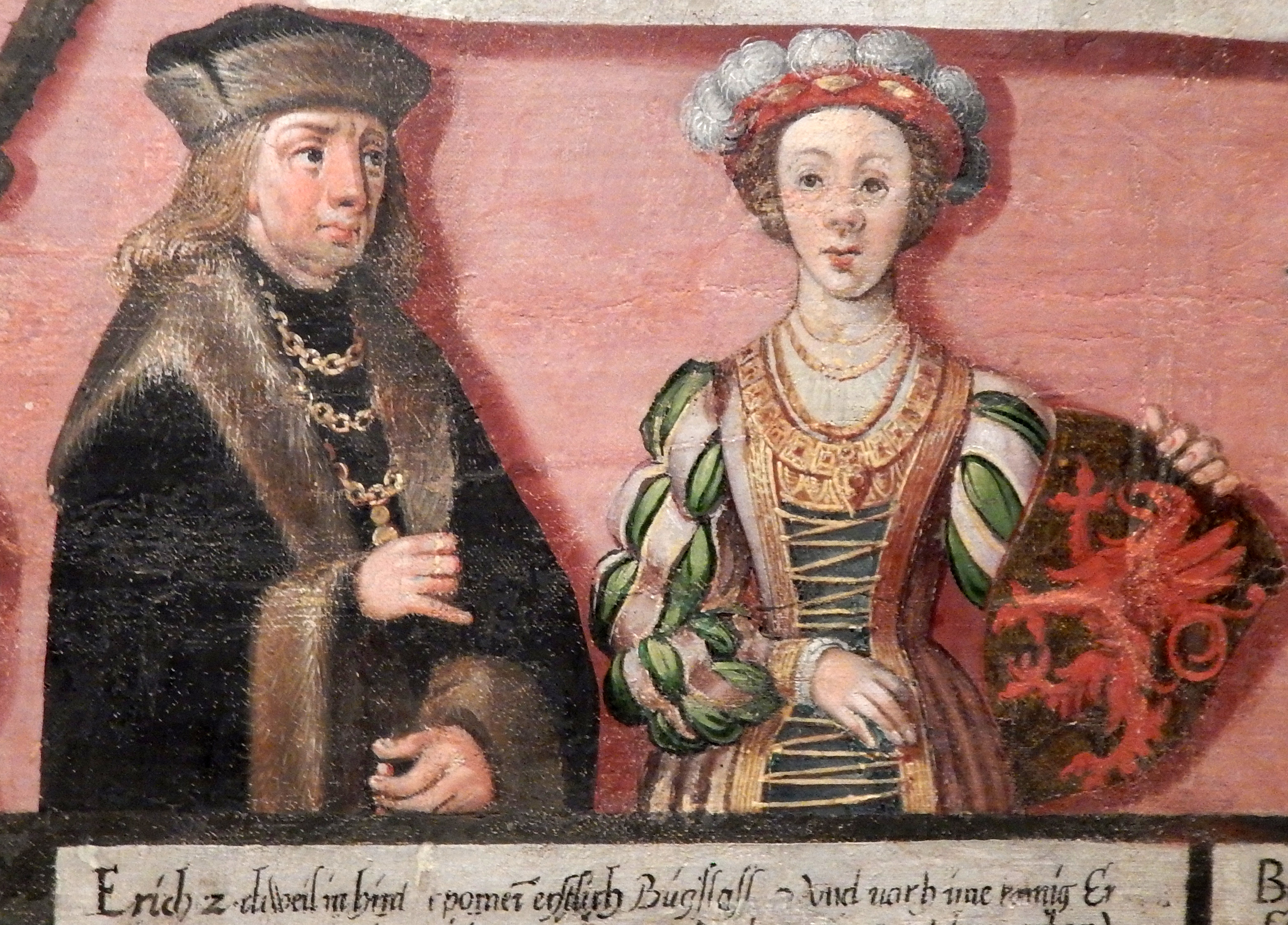 Erich II. von Pommern mit seiner Gemahlin Sophia von Pommern-Stolp auf dem Greifenstammbaum von Cornelius Crommeny.